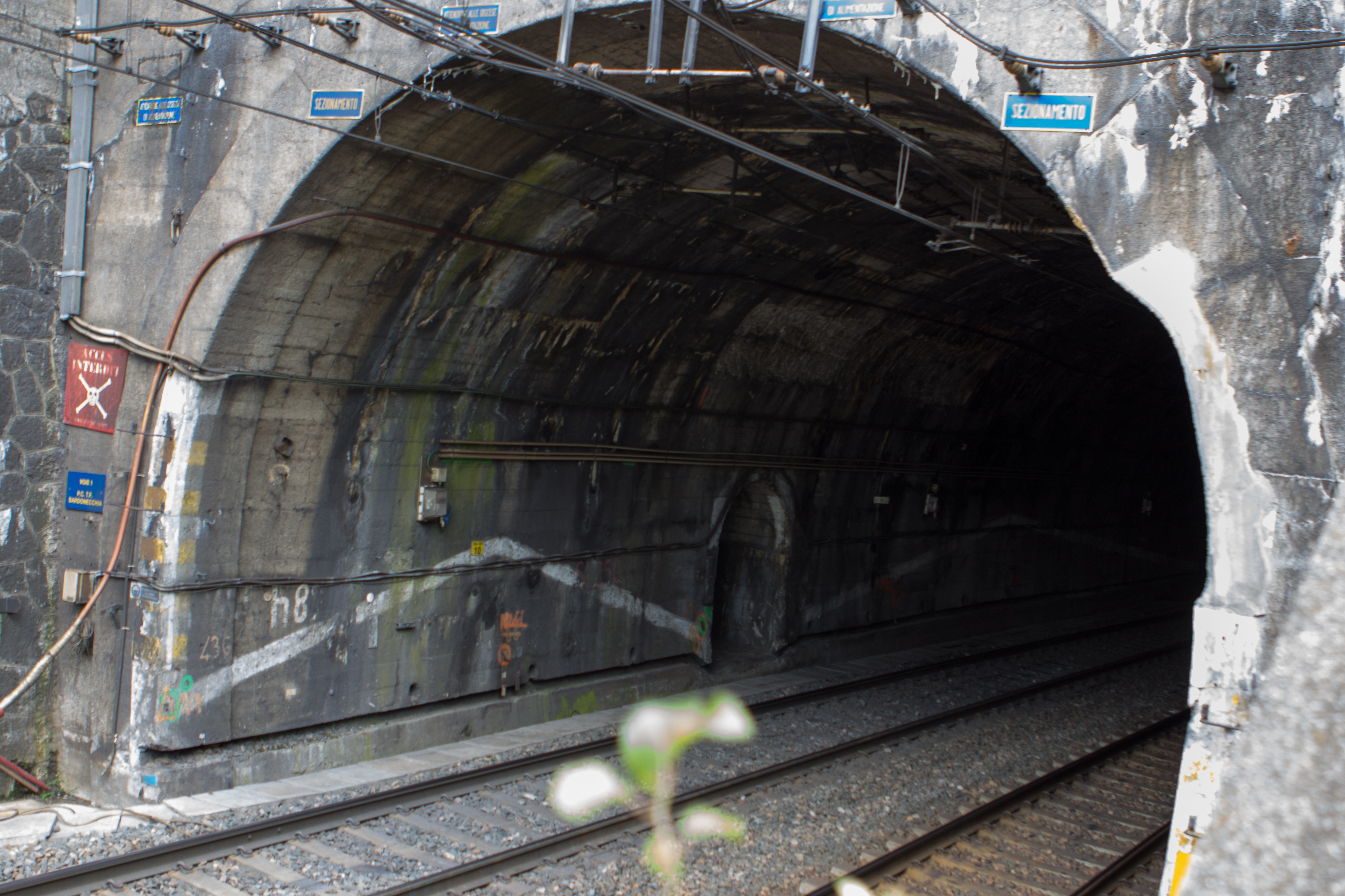 Entrée et accès au tunnel ferroviaire du Mont-Cenis, coté français - Modane, Savoie, France